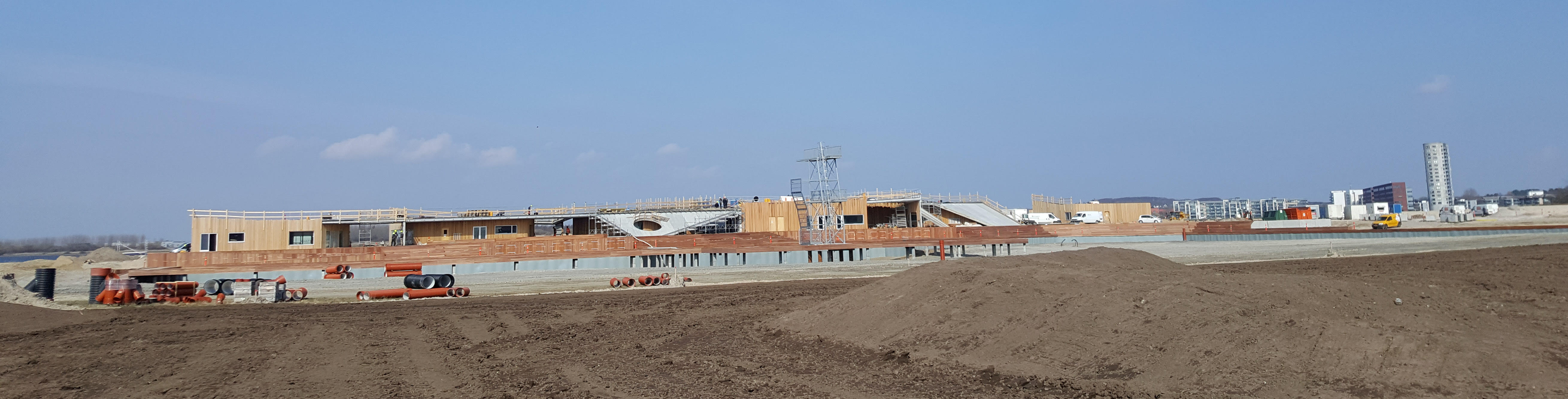 Vestre Fjordpark i Aalborg under etablering foråret 2017